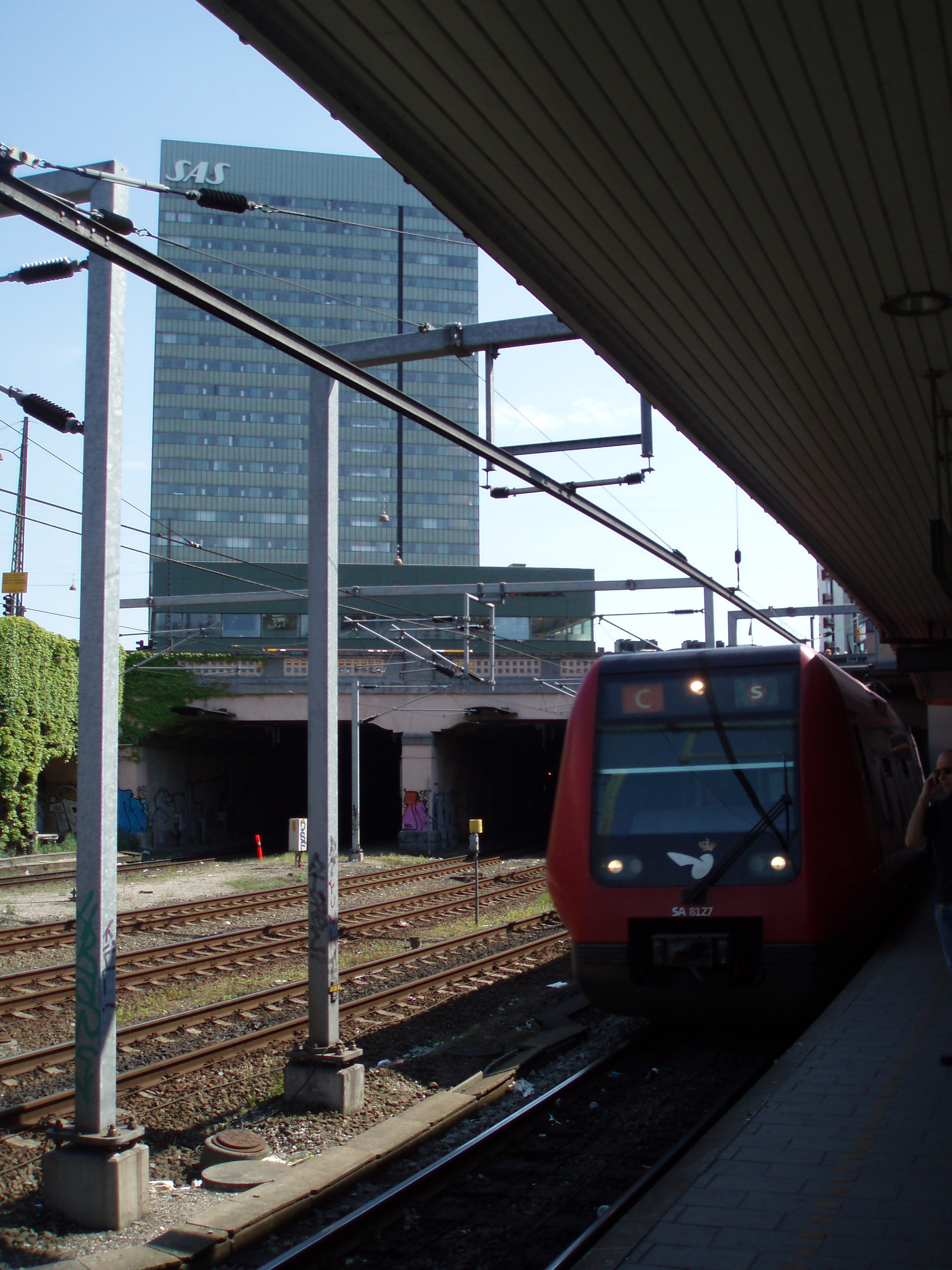 et linje C S-tog der ruller ind på Vesterport Station i København, med Radisson SAS Royal Hotel i baggrunden.